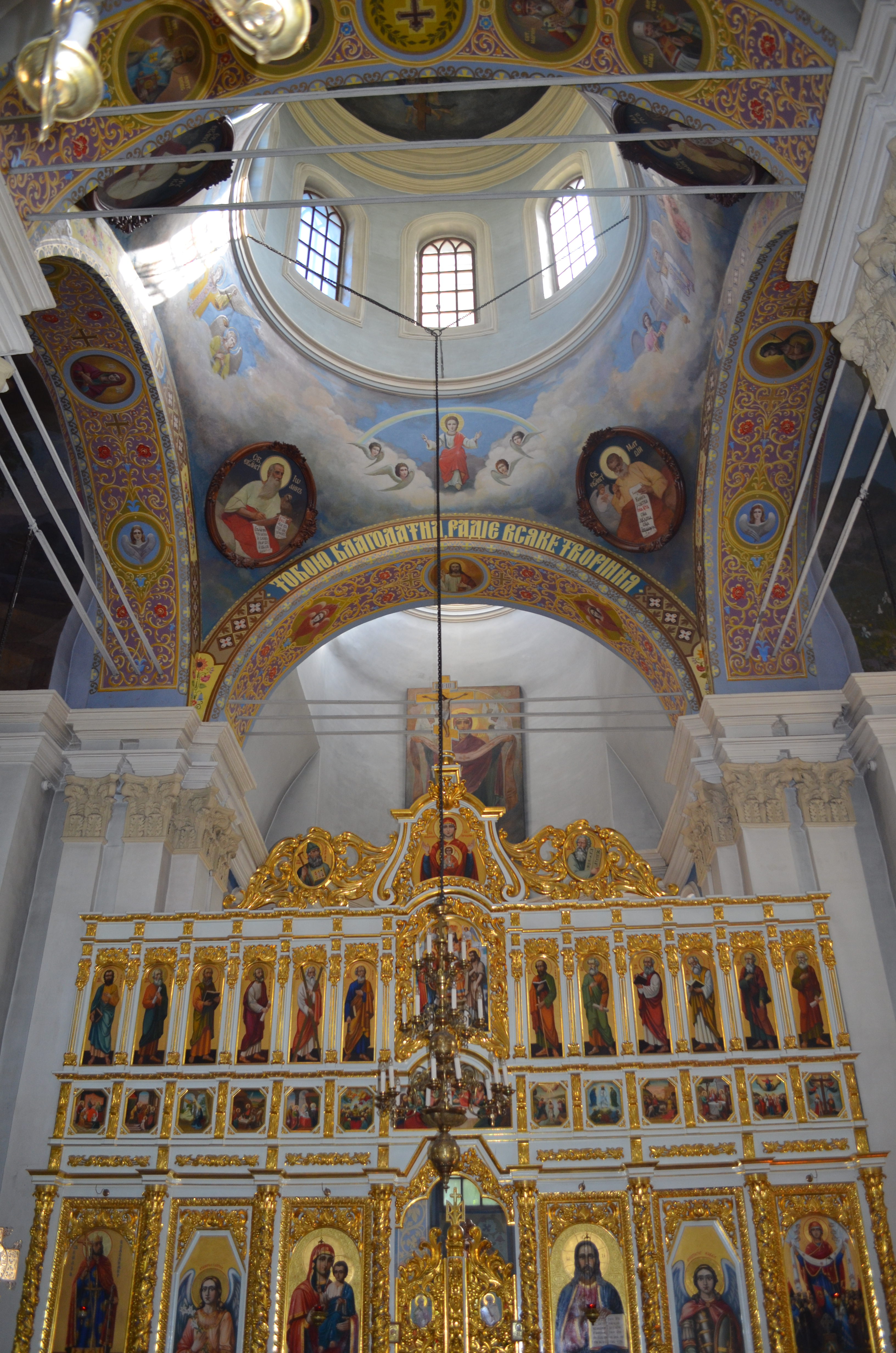 Покровська церква у Києві